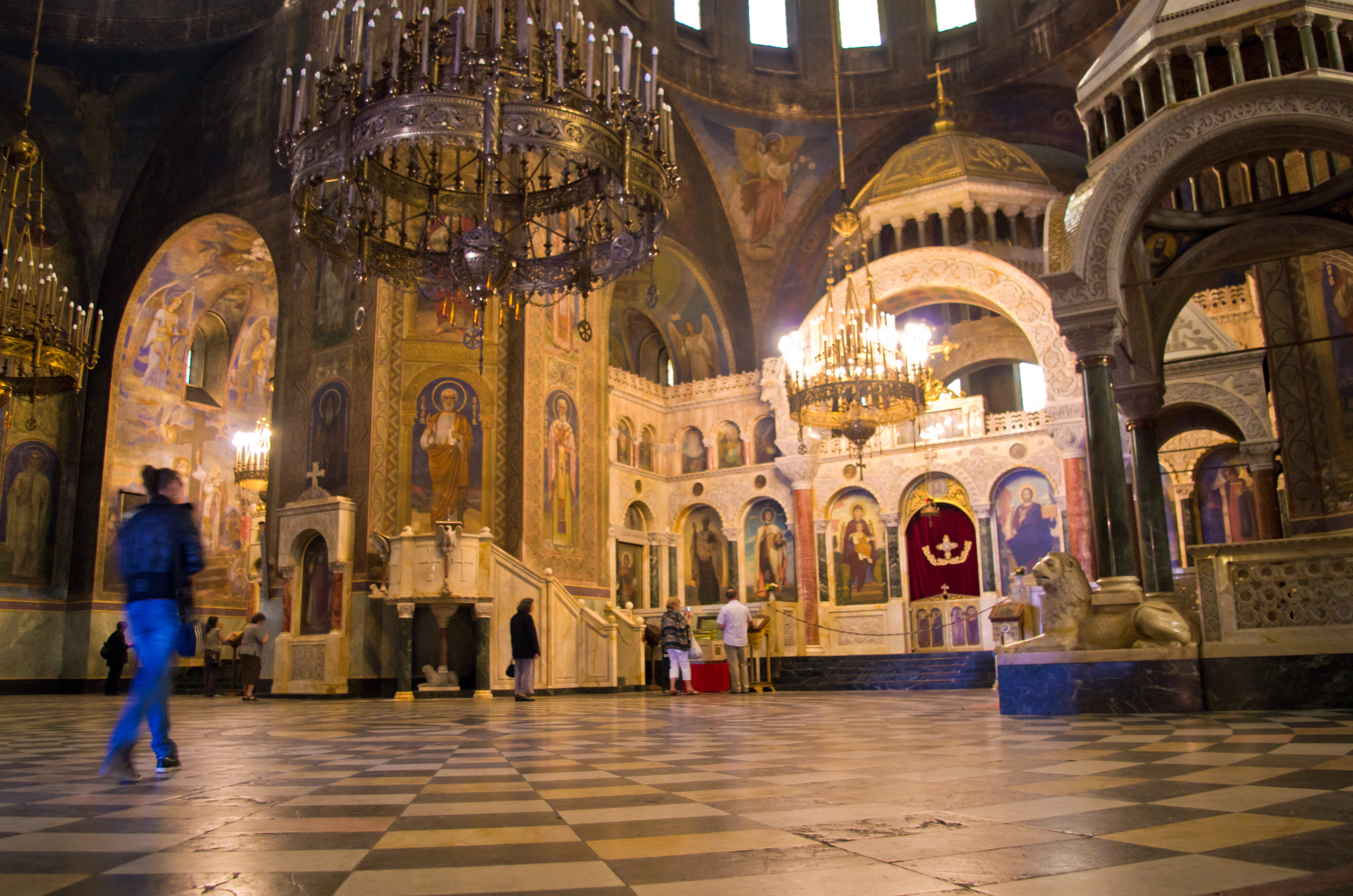 Inside the Alexander Nevsky Cathedral, Sofia